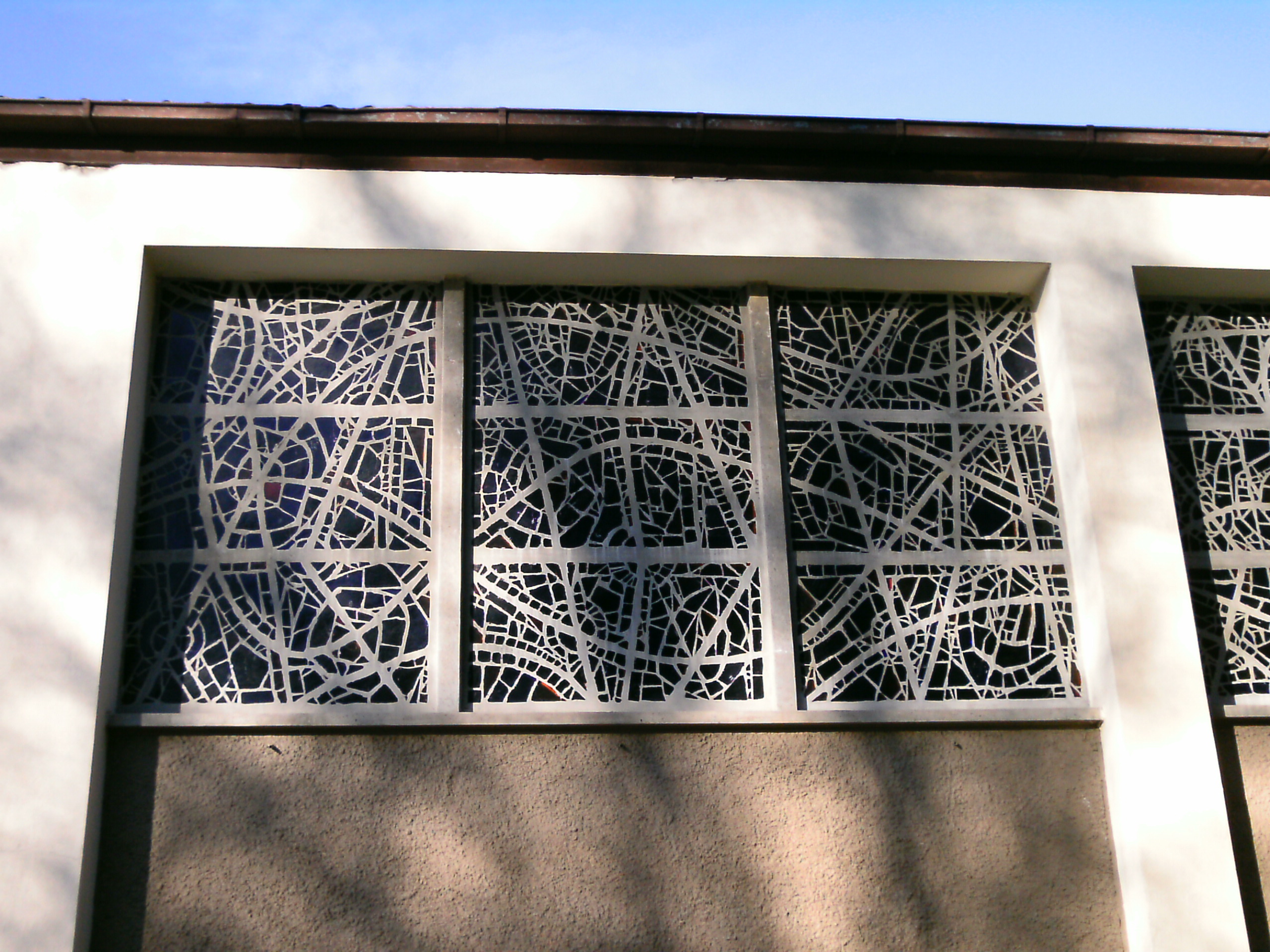 Glasfenster von Mario Decleva an der Südfassade der Kirche Ma.-Königin in Kapfenberg-Schirmitzbühel/Österreich.